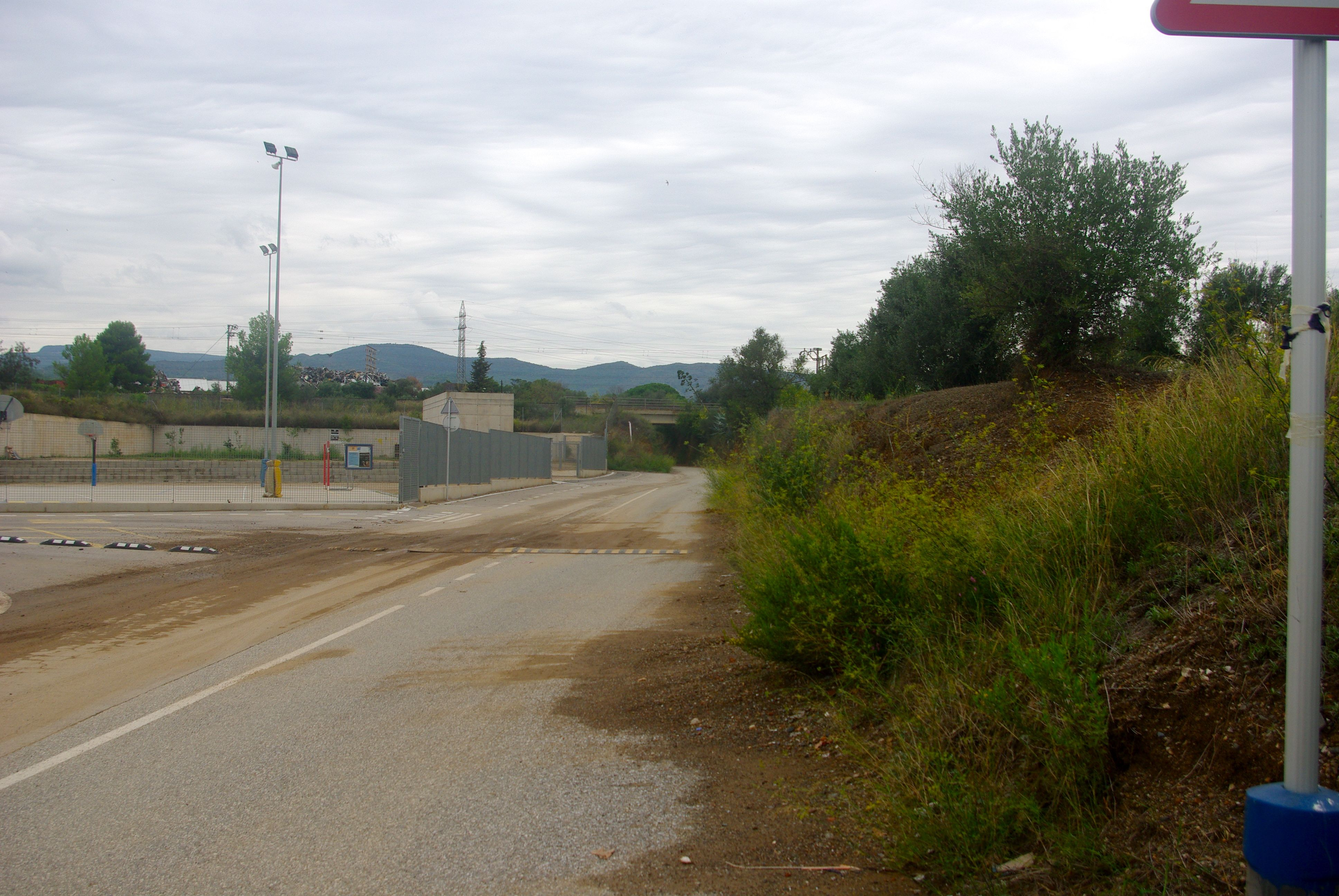 Inici del Camí Vell de la Selva vora la Urbanització de Sant Joan, al terme de Reus